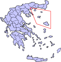 Северо-Эгейские острова на карте Греции